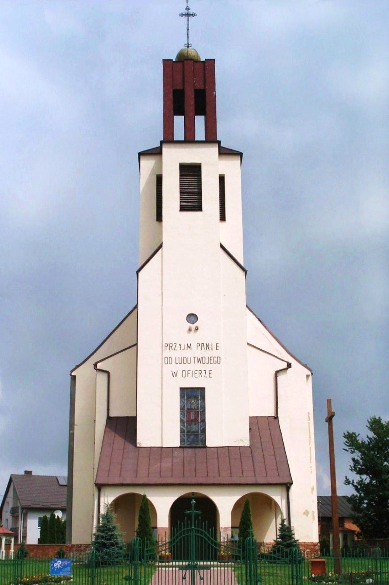 Kościół św. Jana Vianney w Polichnie – proj. A. Gruchalski